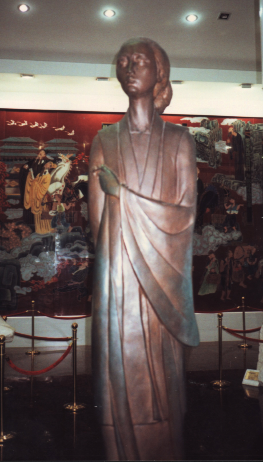 Statue of Song dynasty poet Li Qingzhao in Du Fu Cao Tang, Chongqing